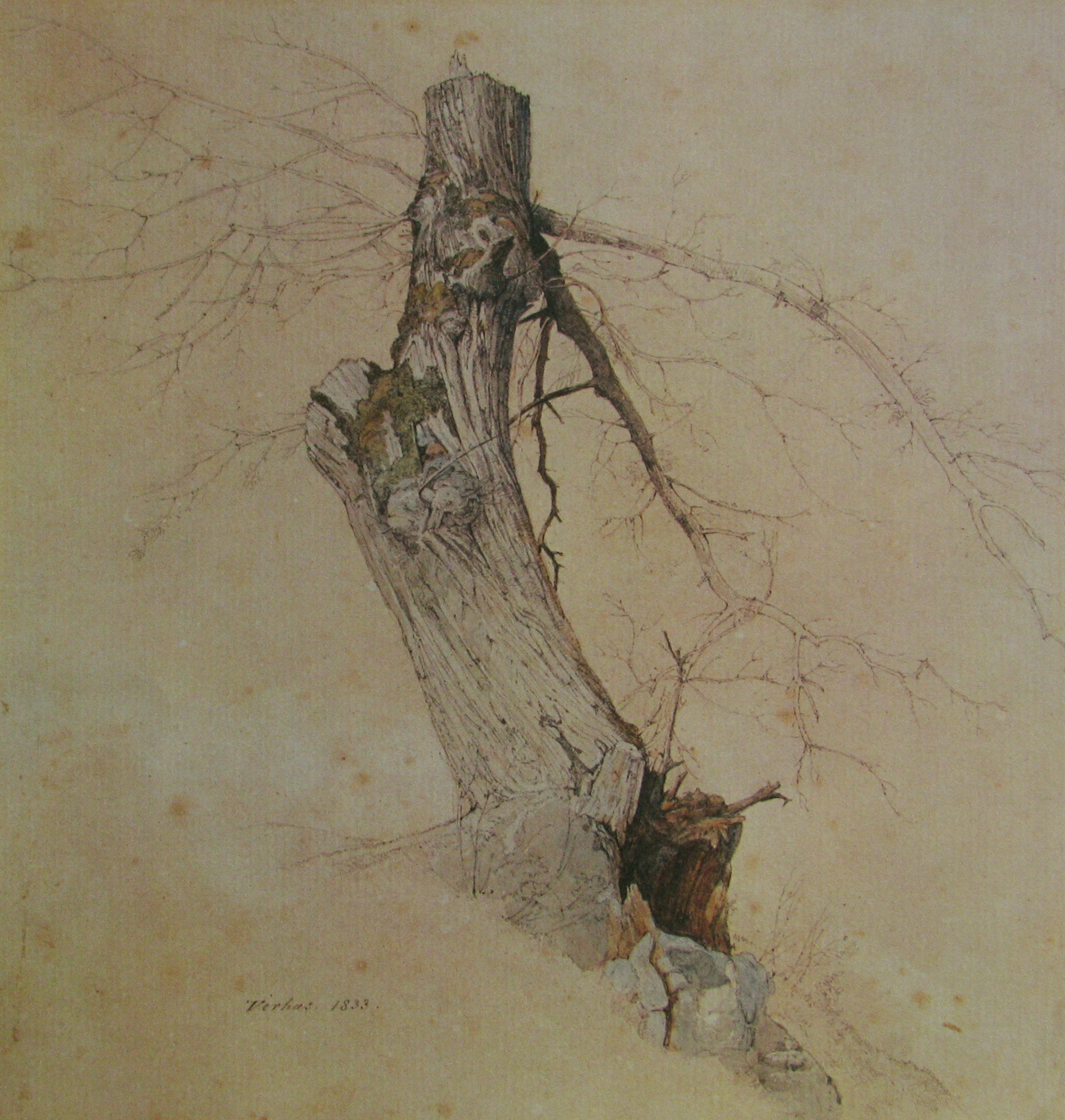 Baumstudie; Aquarellfarben über Bleistift